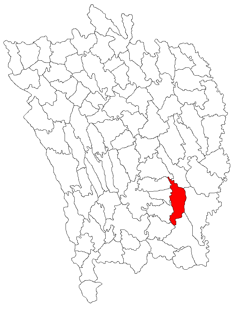 Categorie:Hărţi ale judeţului Vaslui